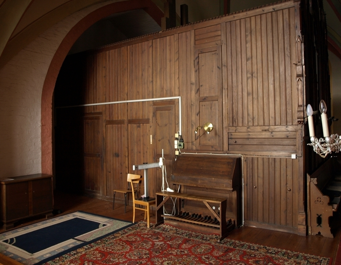 Spieltisch der Friese (III.) Orgel in der St.-Marien-Kirche Boizenburg.